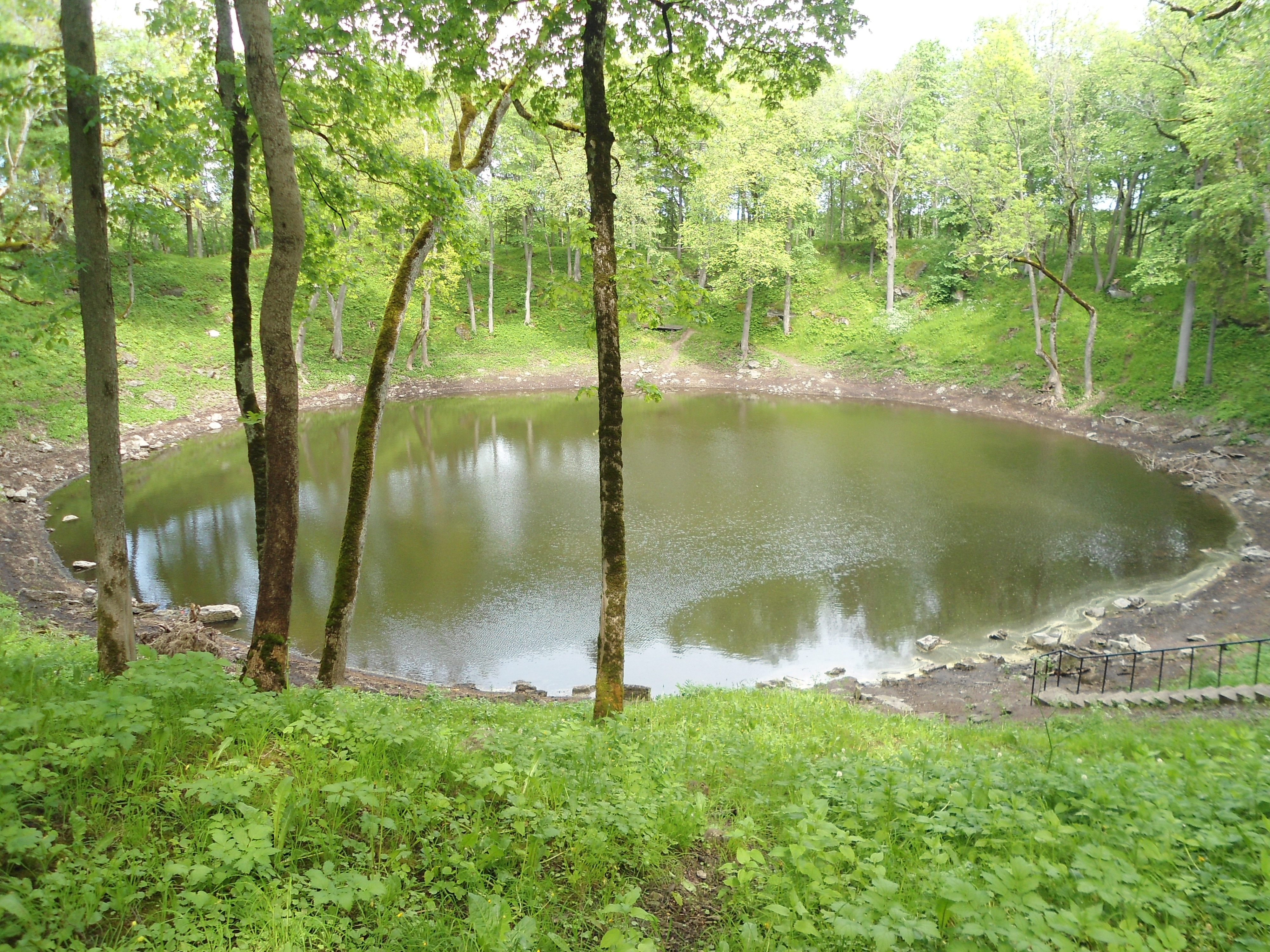 Kaali Crater